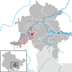 Rohrbach in Thuringia - District Saalfeld-Rudolstadt